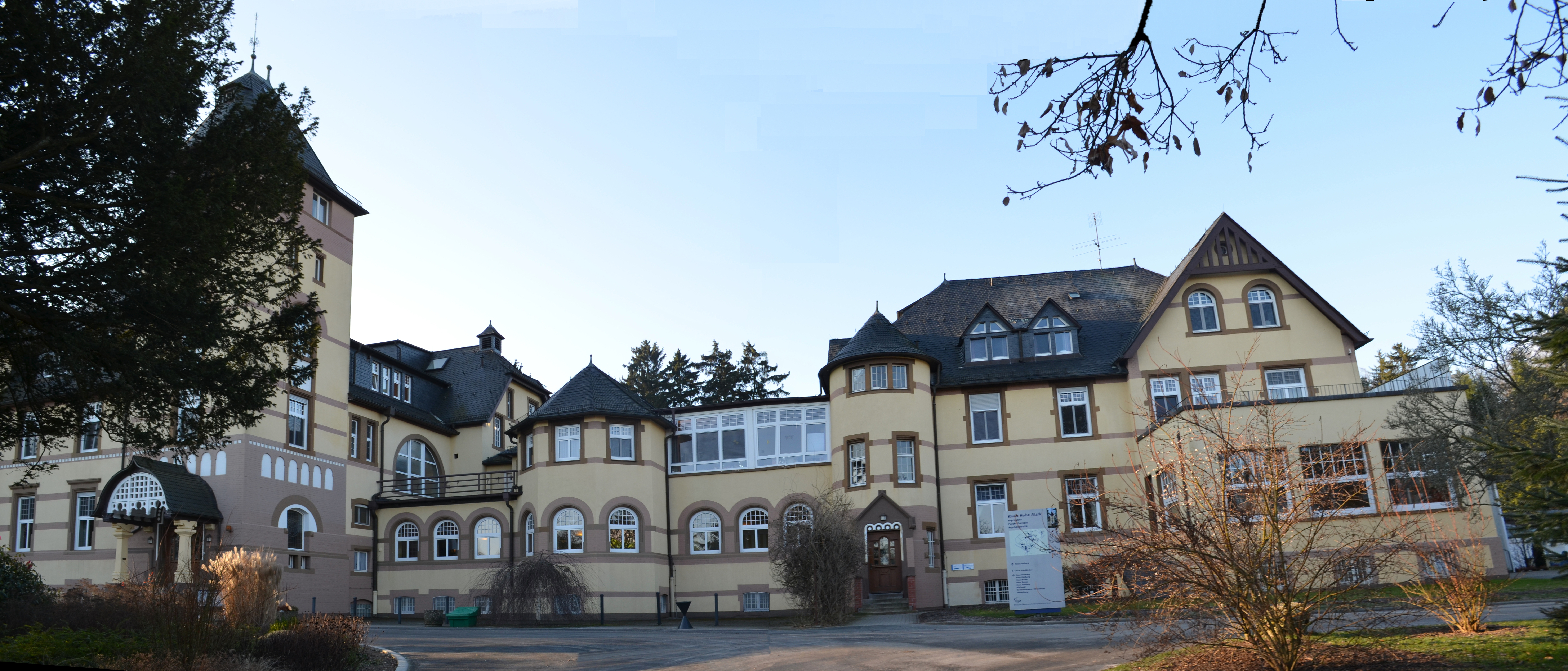 Oberursel, Klinik Hohemark, Hauptgebäude, Seitenanbau